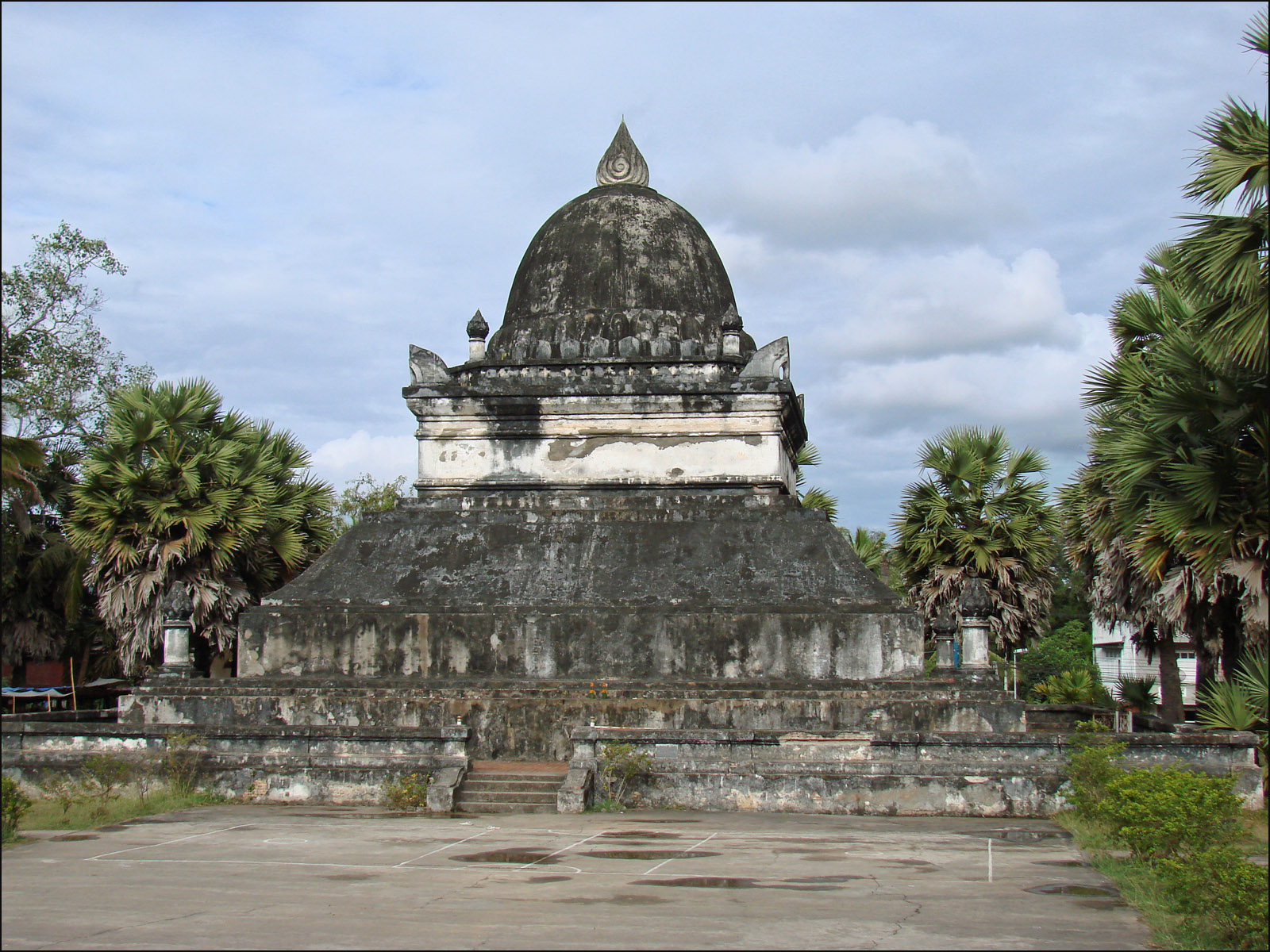 Le That Mak Mo a reçu le surnom de Stupa de la pastèque en raison de sa forme mais son nom véritable est le That Pathoum, le stupa du grand lotus. Le Lotus fait allusion à la pureté, la courge fait référence à la légende de création du peuple Lao. Il a été érigé en 1504 ou 1514 sur ordre de la Reine Phan Tinh Xieng, épouse du Roi Vixunarath dans l'enceinte du Vat Vixun. L'architecture du That Makmo révèle une forte influence cinghalaise avec ses minuscules stupa aux quatre coins de l'édifice qui symbolisent les quatre éléments